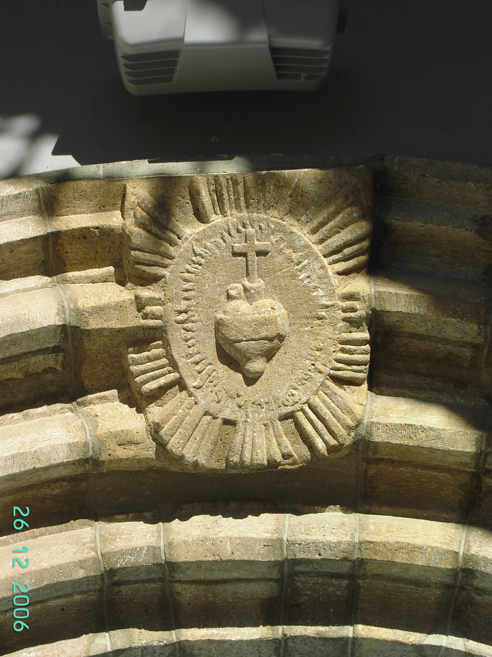 Un Sagrado Corazón en la portalada de la iglesia de Torla. En realidad, el tyemplo está consagrado a San Salvador.